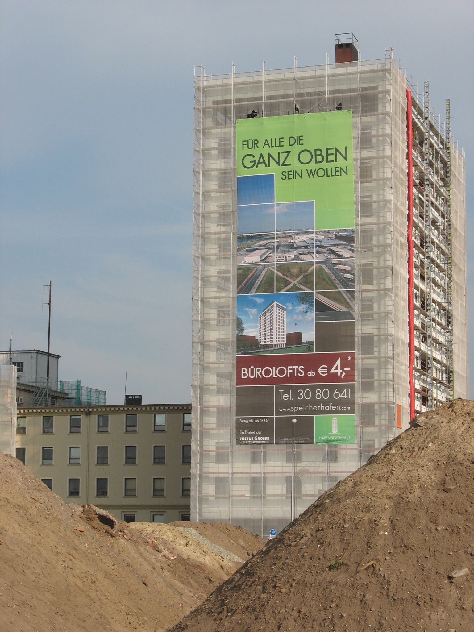 Bremen, Überseestadt, Brachland an der Konsul-Smidt-Straße, Blick aufs Hafenhaus